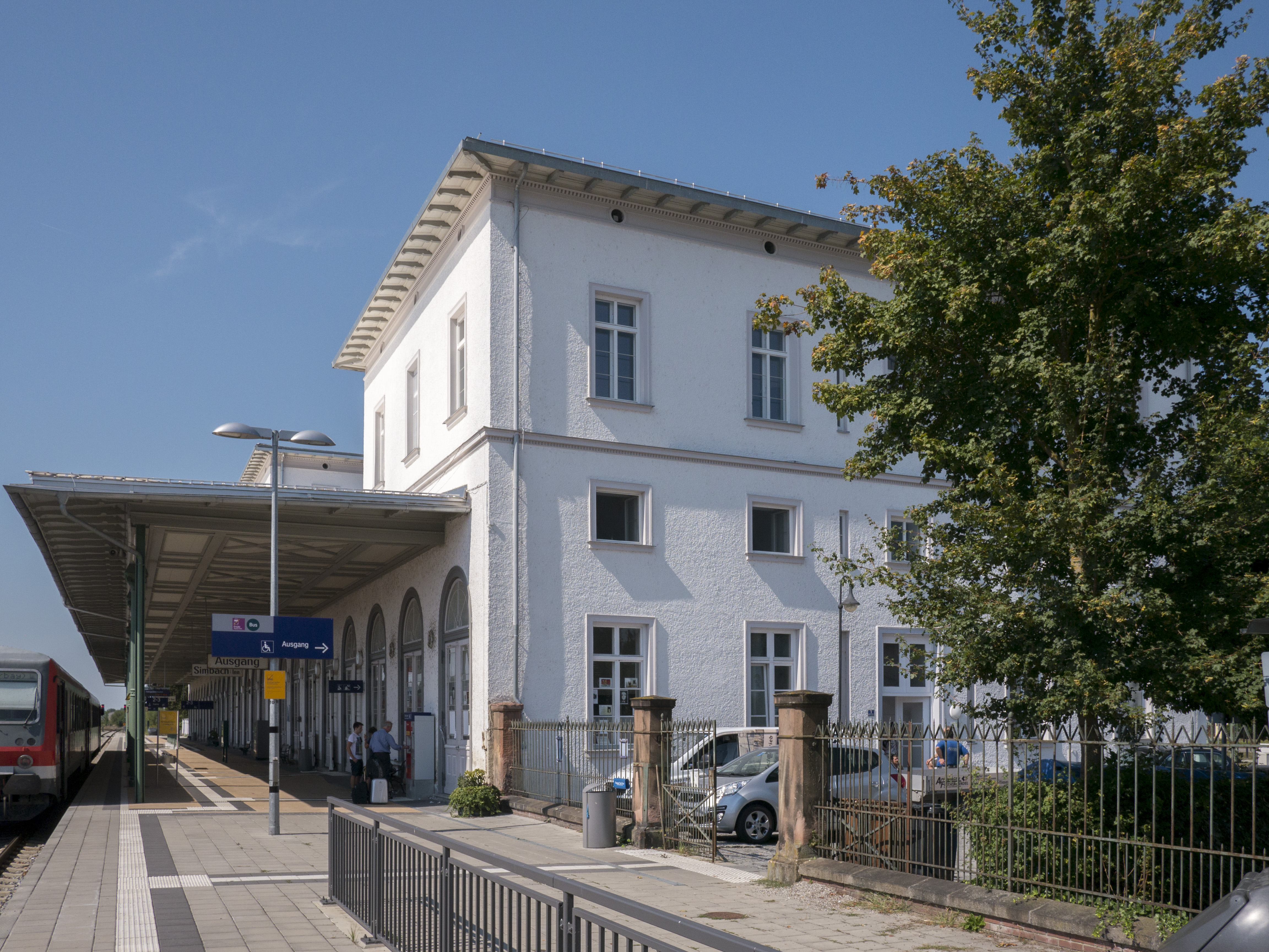 Simbach BahnhofThis is a photograph of an architectural monument.